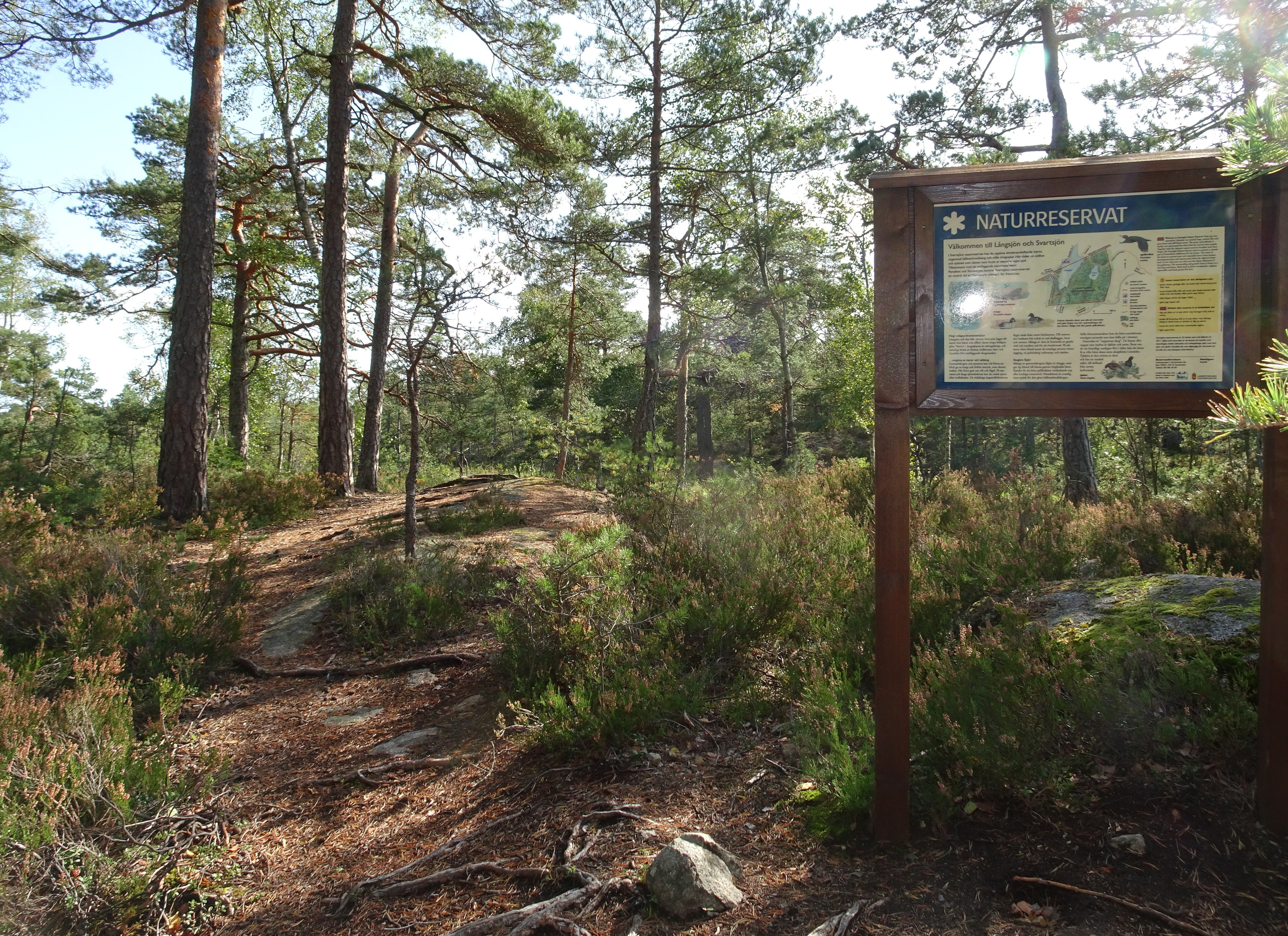 Entré till Svartsjöns naturreservat